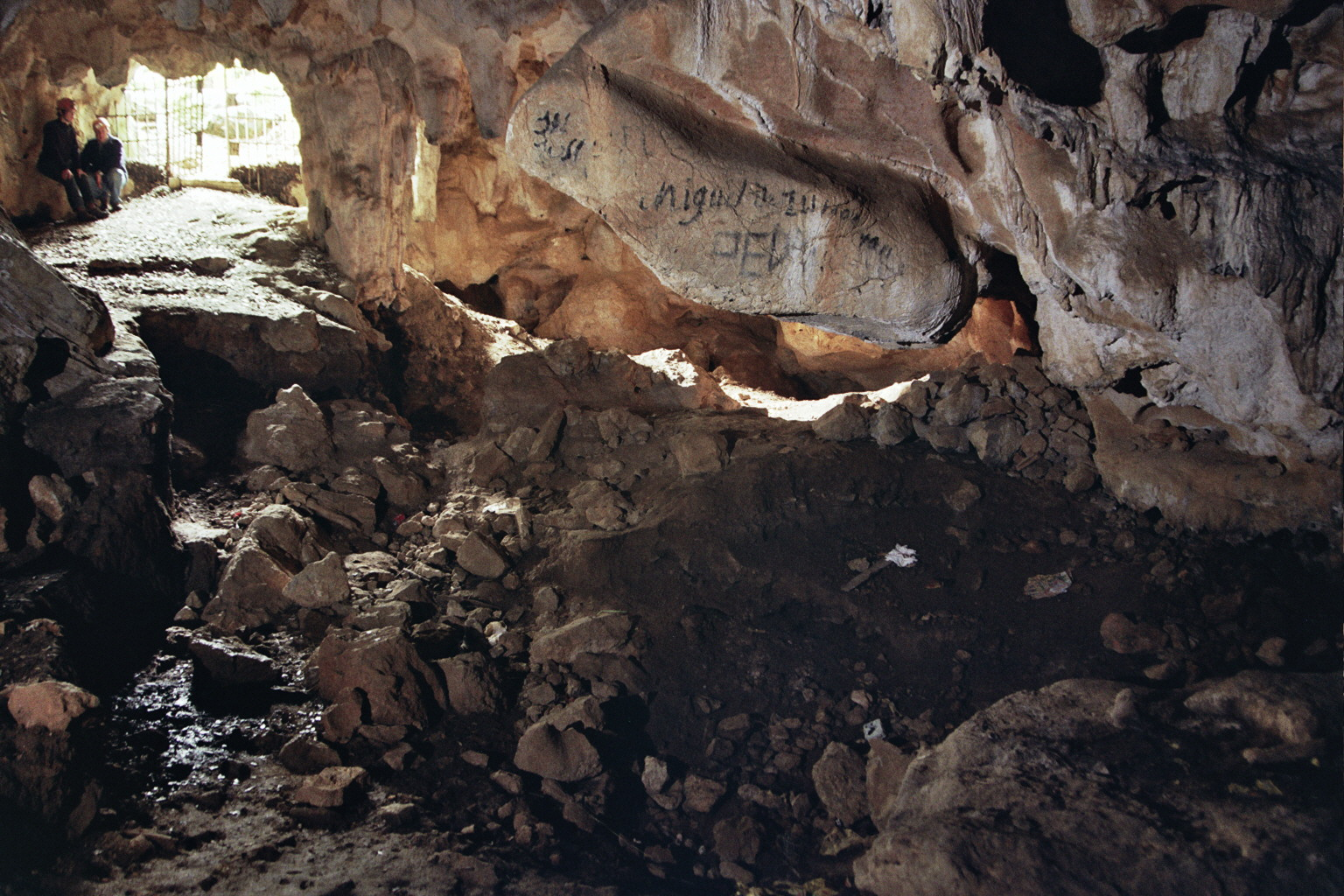 Garratxa I kobazuloaren ataria (Lumentxa mendia, Lekeitio). Kobazulo honetan daude 2012an aurkitutako labar-arte irudiak.